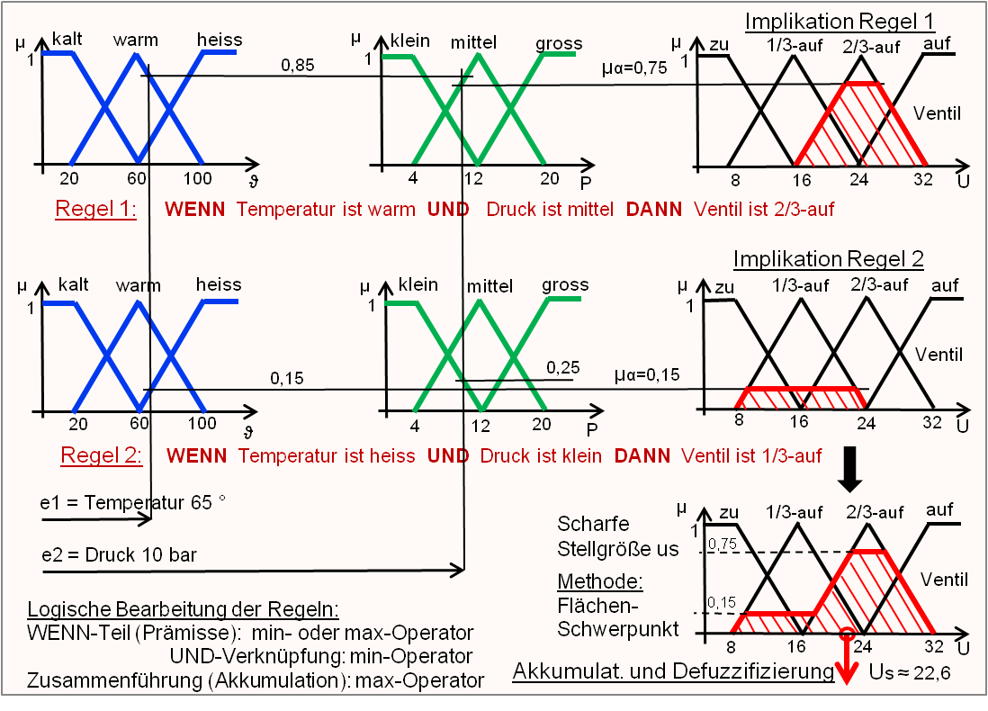 Signalflussdiagramm eines Fuzzy-Controllers mit 2 Grundmengen